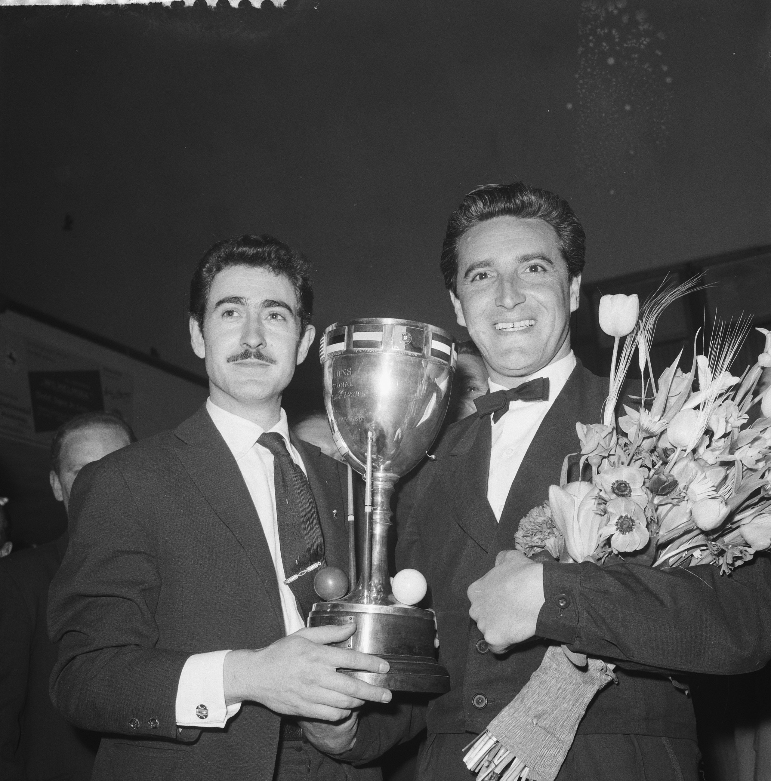 Collectie / Archief : Fotocollectie Anefo Reportage / Serie : [ onbekend ] Beschrijving : Wereldkampioenschappen driebanden biljart te Amsterdam. Links Vieira en rechts wereldkampioen Suarez Datum : 23 april 1961 Locatie : Amsterdam, Noord-Holland Trefwoorden : biljarten, wereldkampioenschappen Persoonsnaam : Driebanden Fotograaf : Rossem, Wim van / Anefo Auteursrechthebbende : Nationaal Archief Materiaalsoort : Negatief (zwart/wit) Nummer archiefinventaris : bekijk toegang 2.24.01.03 Bestanddeelnummer : 912-3928